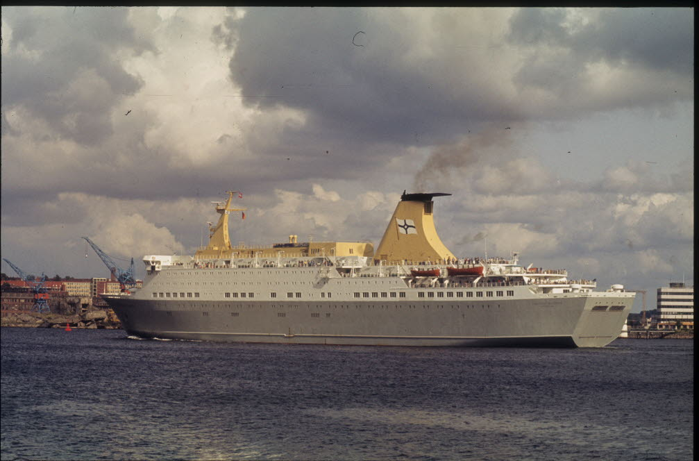 beim Auslaufen aus Kiel.